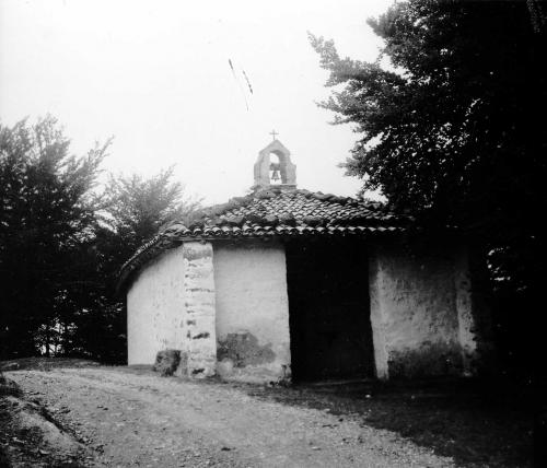 Ermita de San Miguel. Gonzarri.